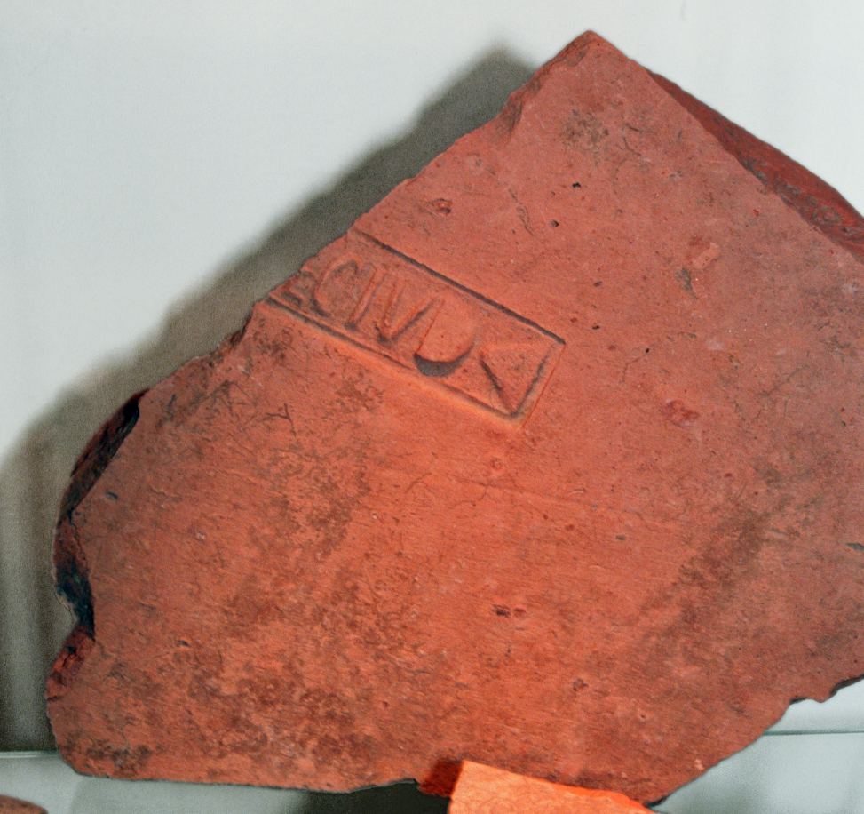 Visegrád-Lepence (Burgus Solva 23 mit mittelkaiserzeitlicher Siedlung), Ungarn: Ziegelstempel. Aufgenommen während der provinzialrömischen Sonderausstellung „Visegrád évszázadai – A római kor kezdete a Dunakanyarban“ die vom 19.08.2011 bis 20.07.2012 im Mátyás Király Múzeum (König-Matthias-Museum), Visegrád, stattfand.